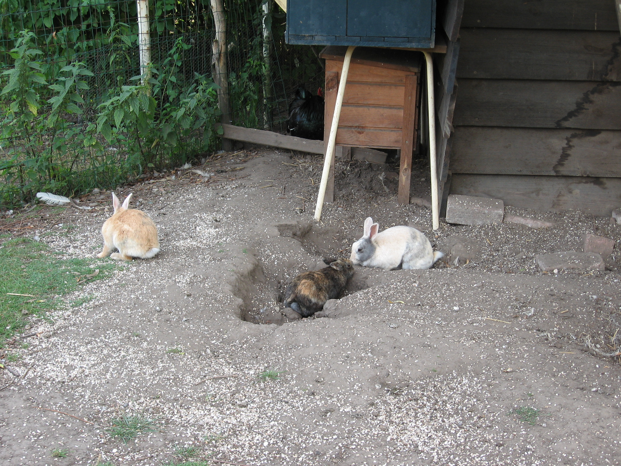 gemaakt in de kippenweide, op een mooie zomerse dag